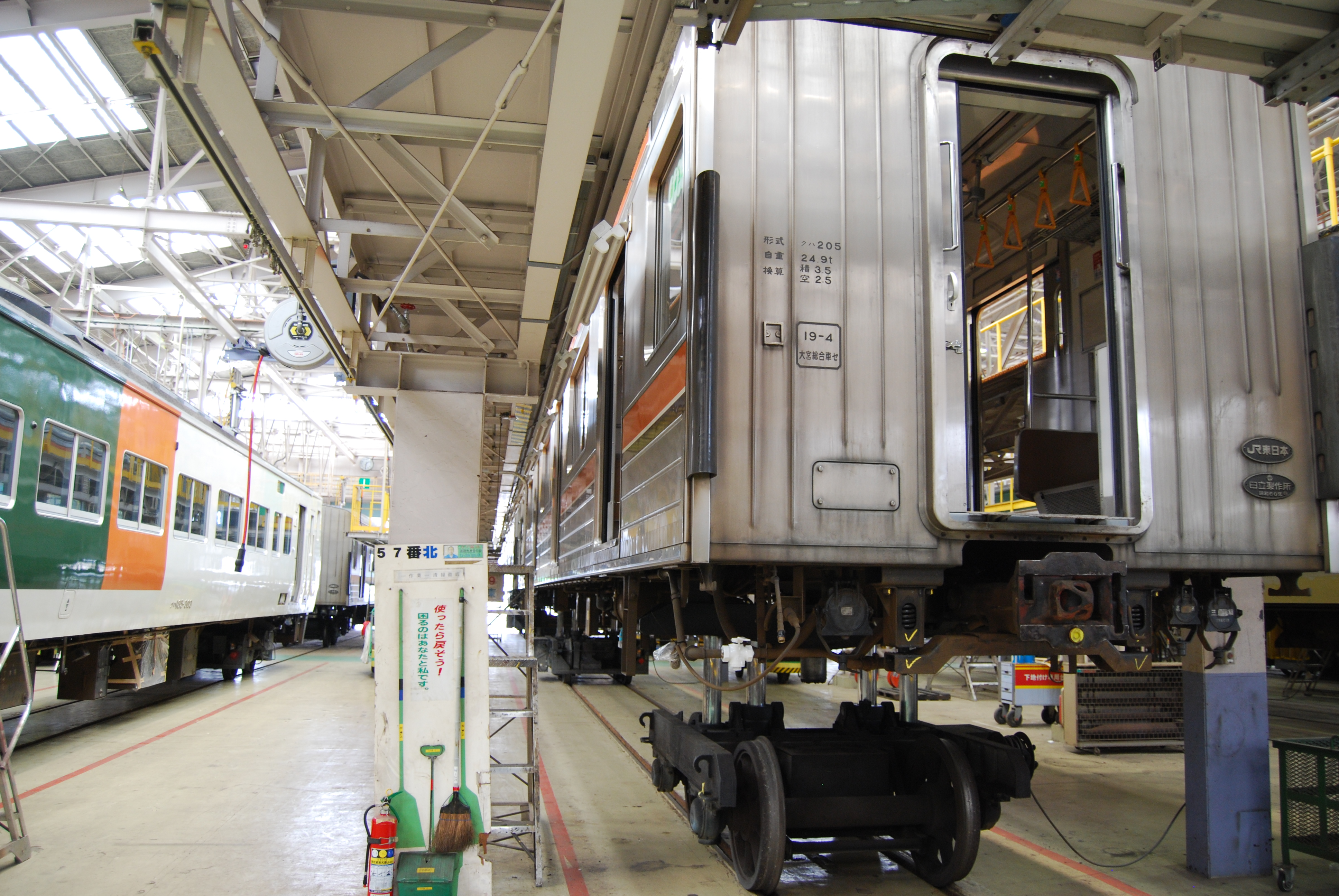 全般検査中の車両、仮台車を履きジャッキアップされている（JRおおみやふれあい鉄道フェアーの工場開放にて撮影）